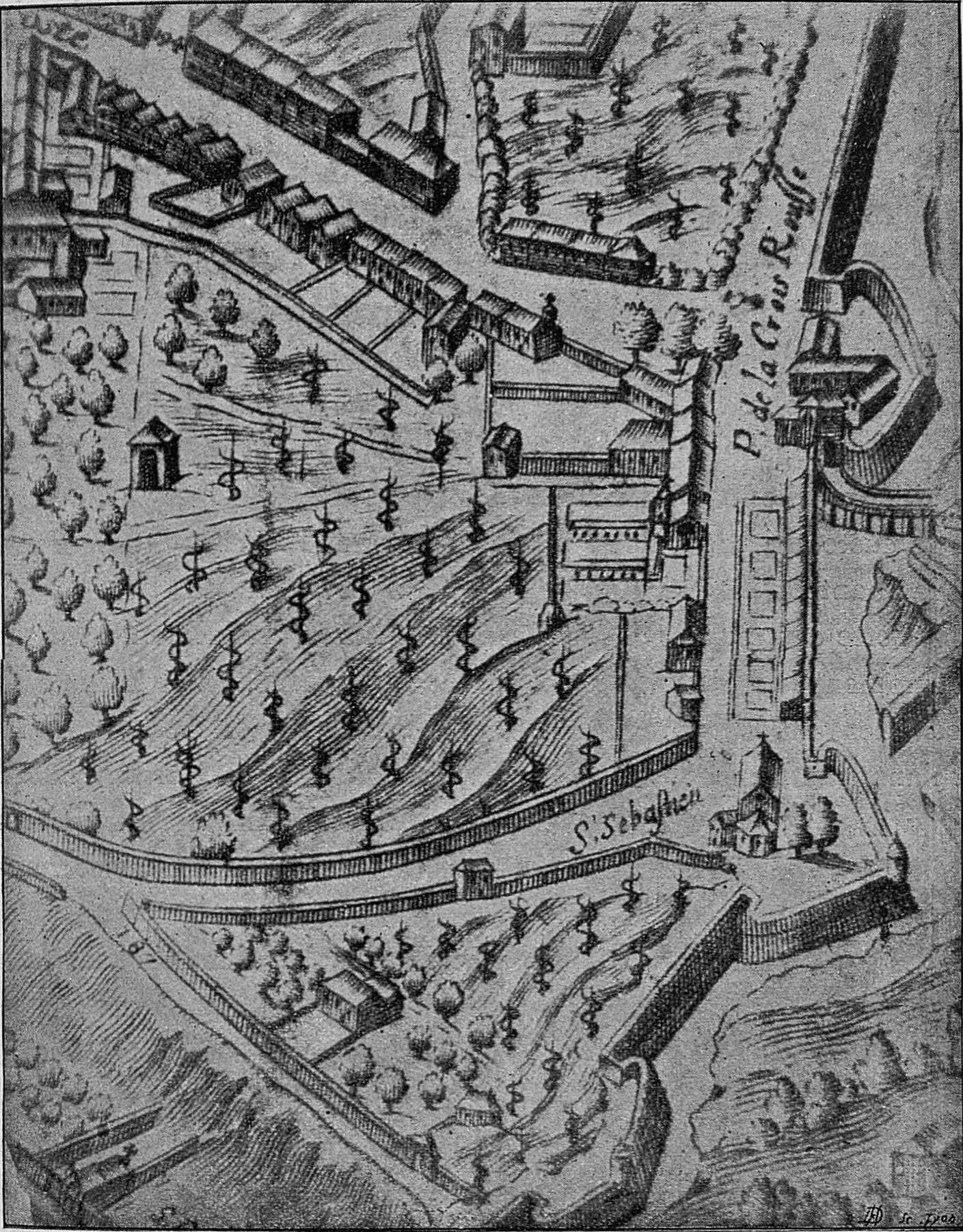 Illustration de l'ouvrage « Les anciens couvents de Lyon » (1895) par Adolphe Vachet